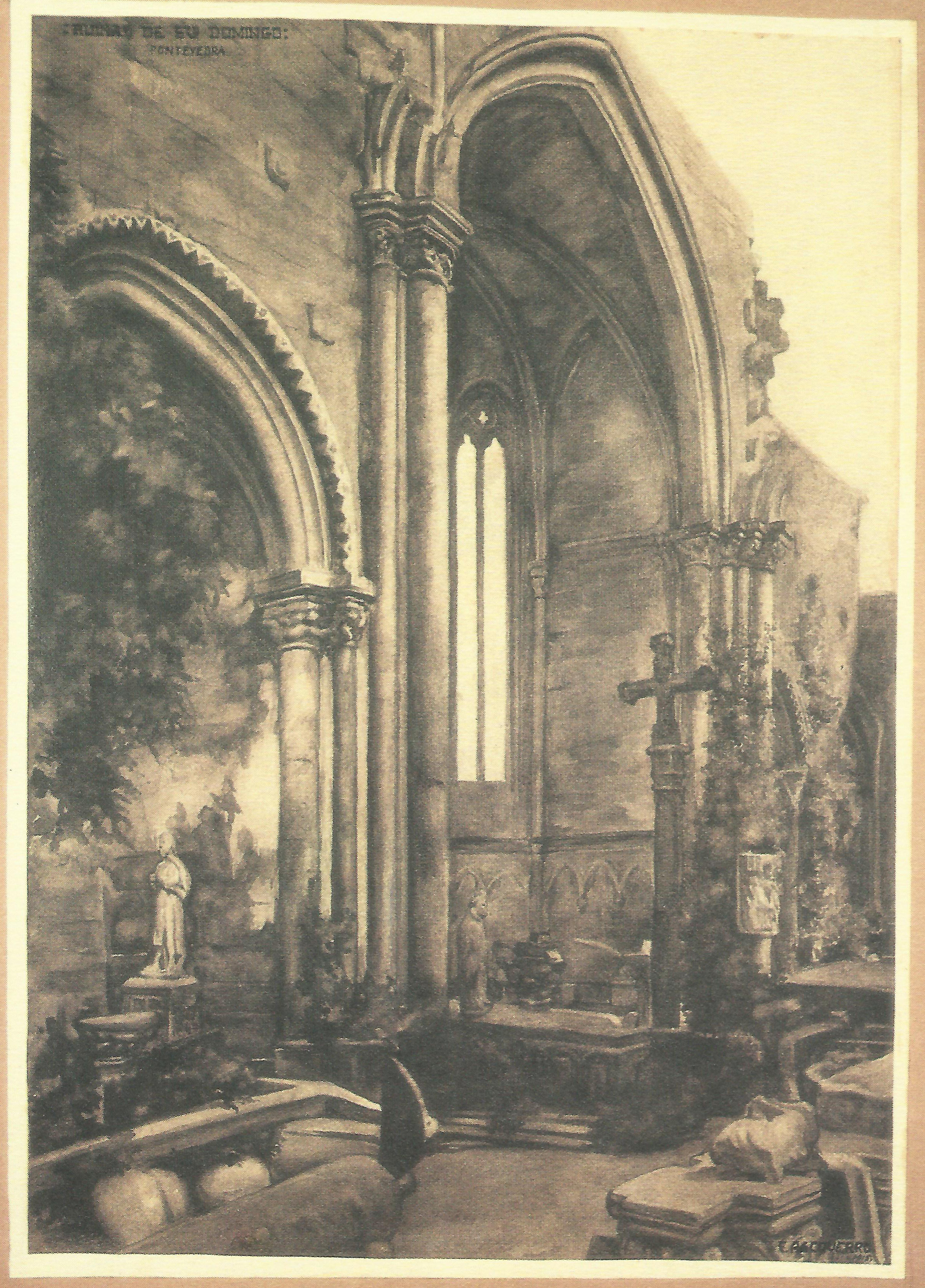 Ruínas da igrexa de San Domingos de Pontevedra. Debuxo de Federico Alcoverro López (1879-1916)